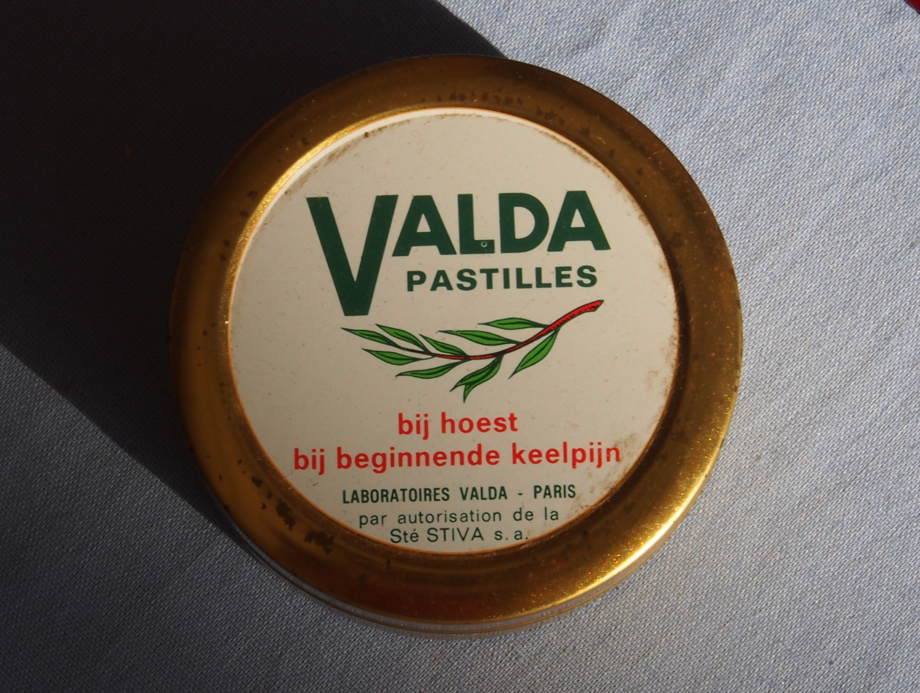 Valda pastilles, Laboratoires Valda - Paris